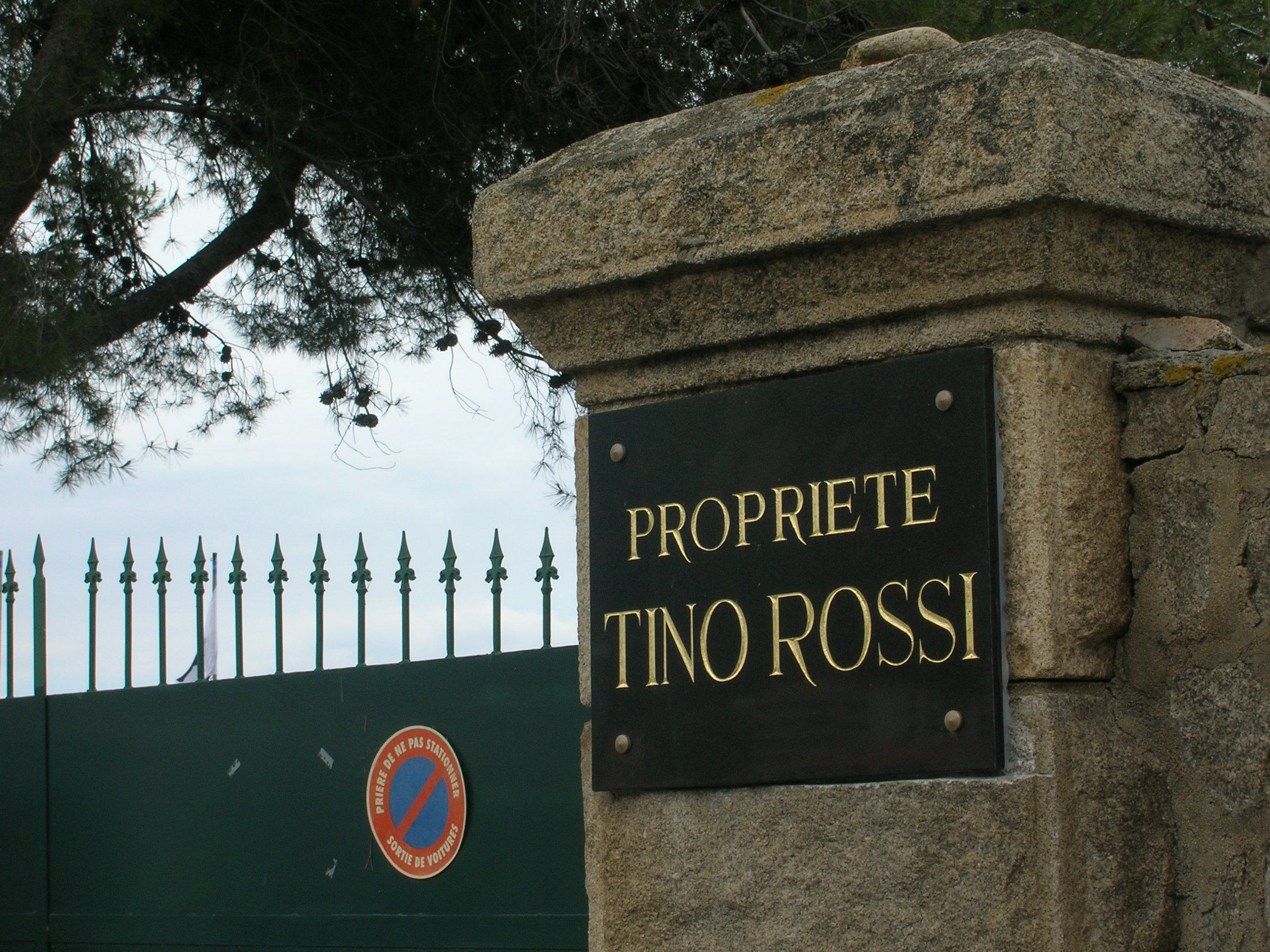 Villa vum verstuerwenen Tino Rossi